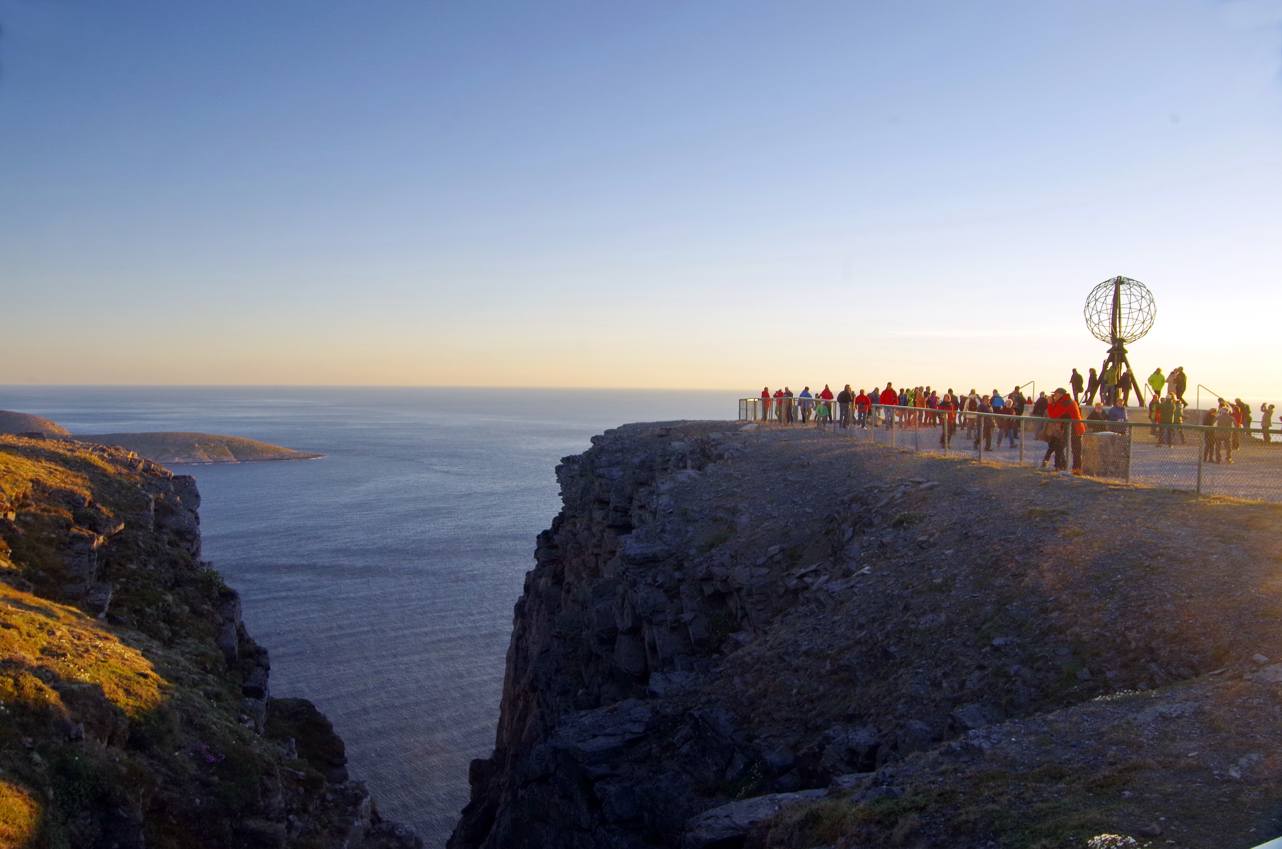 Nordkap